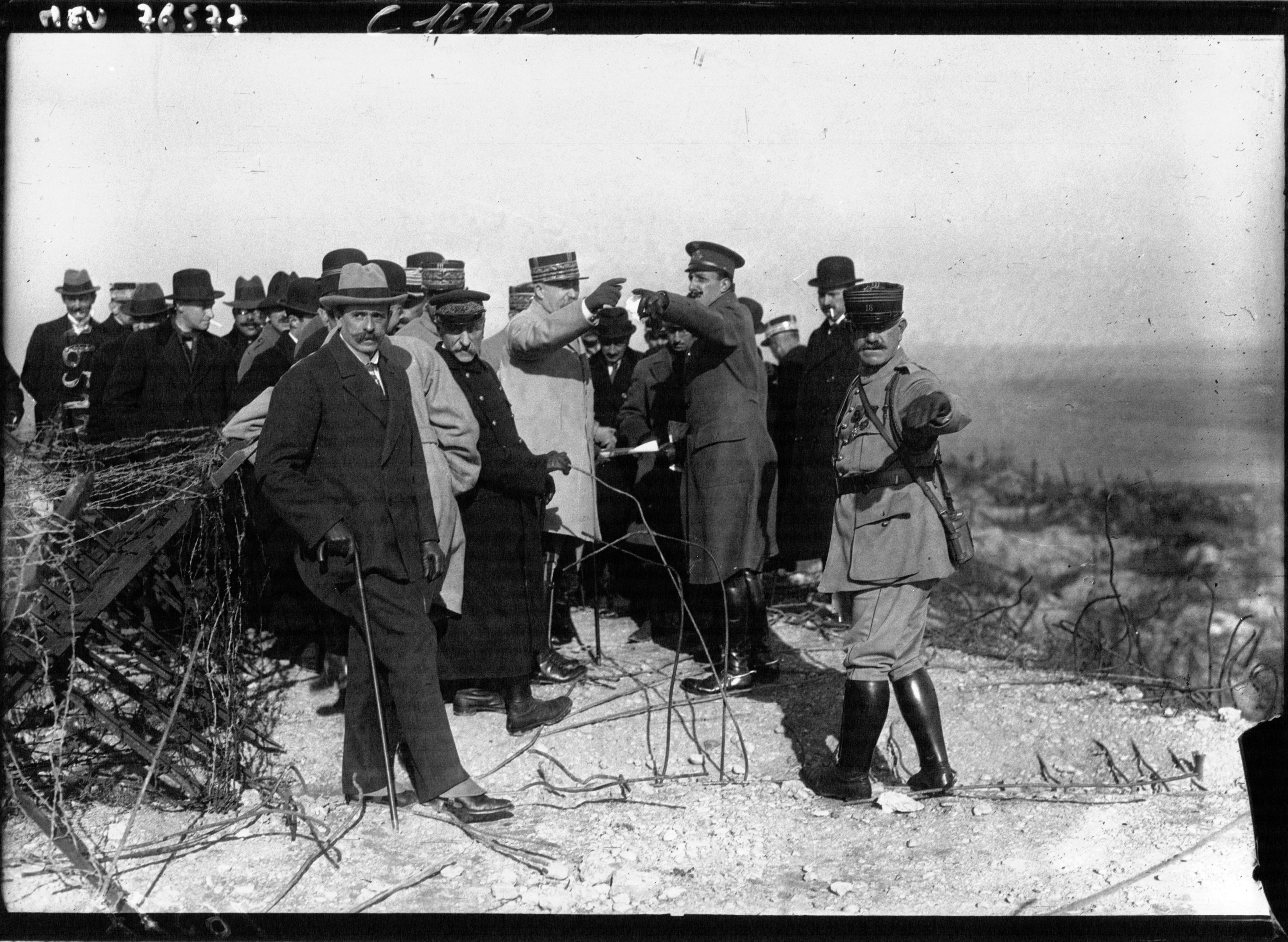 Visite du roi Alphonse XIII à Verdun en 1919, ici sur les dessus du fort de Vaux.